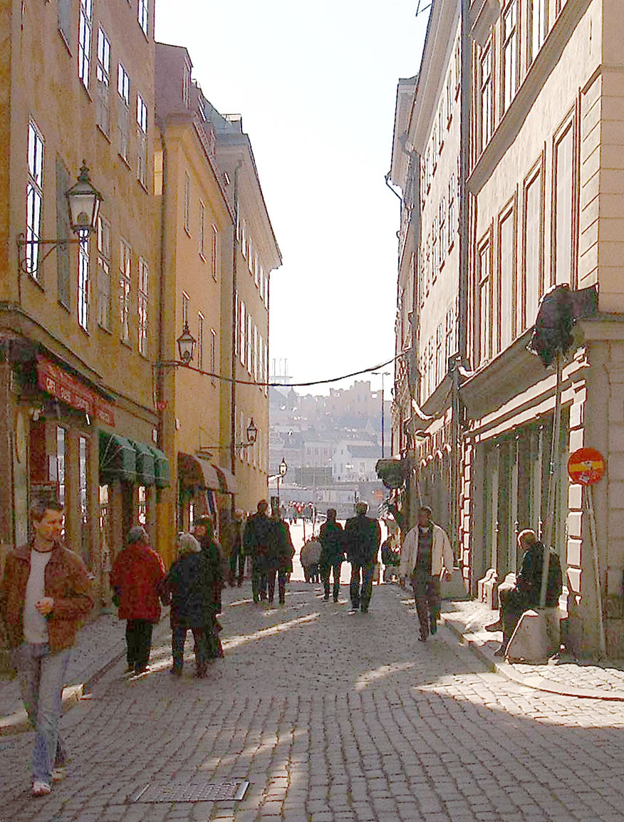 Järntorgsgatan, Gamla stan, Stockholm. Light adjusted, rotated, cropped.